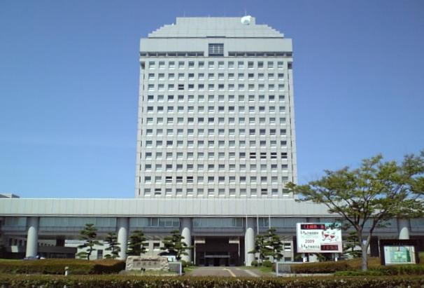 新潟県庁舎。